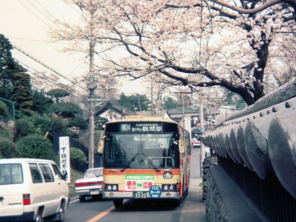 Kanachu Ya25（や25） Mitsubishi P-MP218M